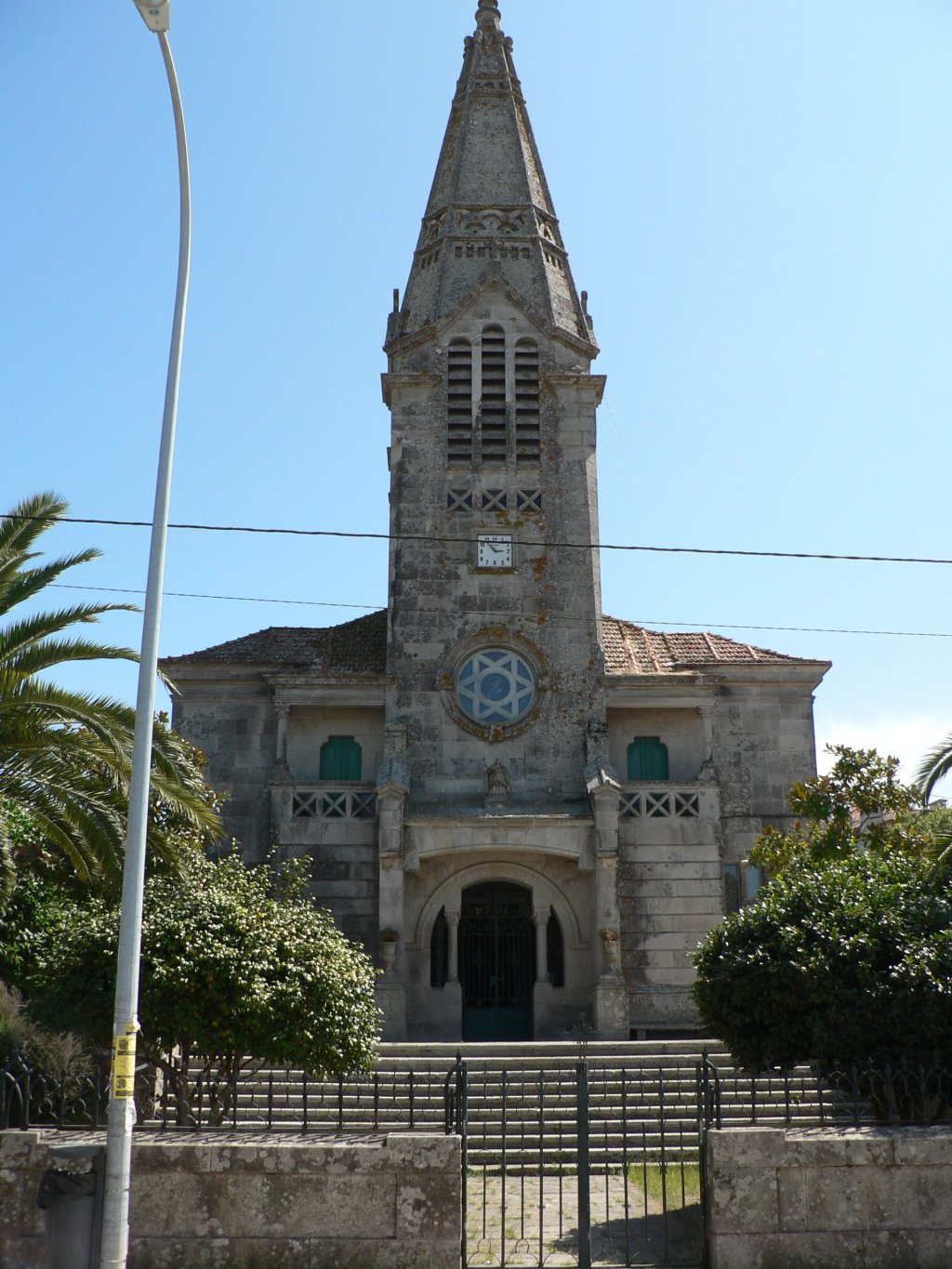 Igrexa de Santa Cristina en Sabarís, Baiona, España.